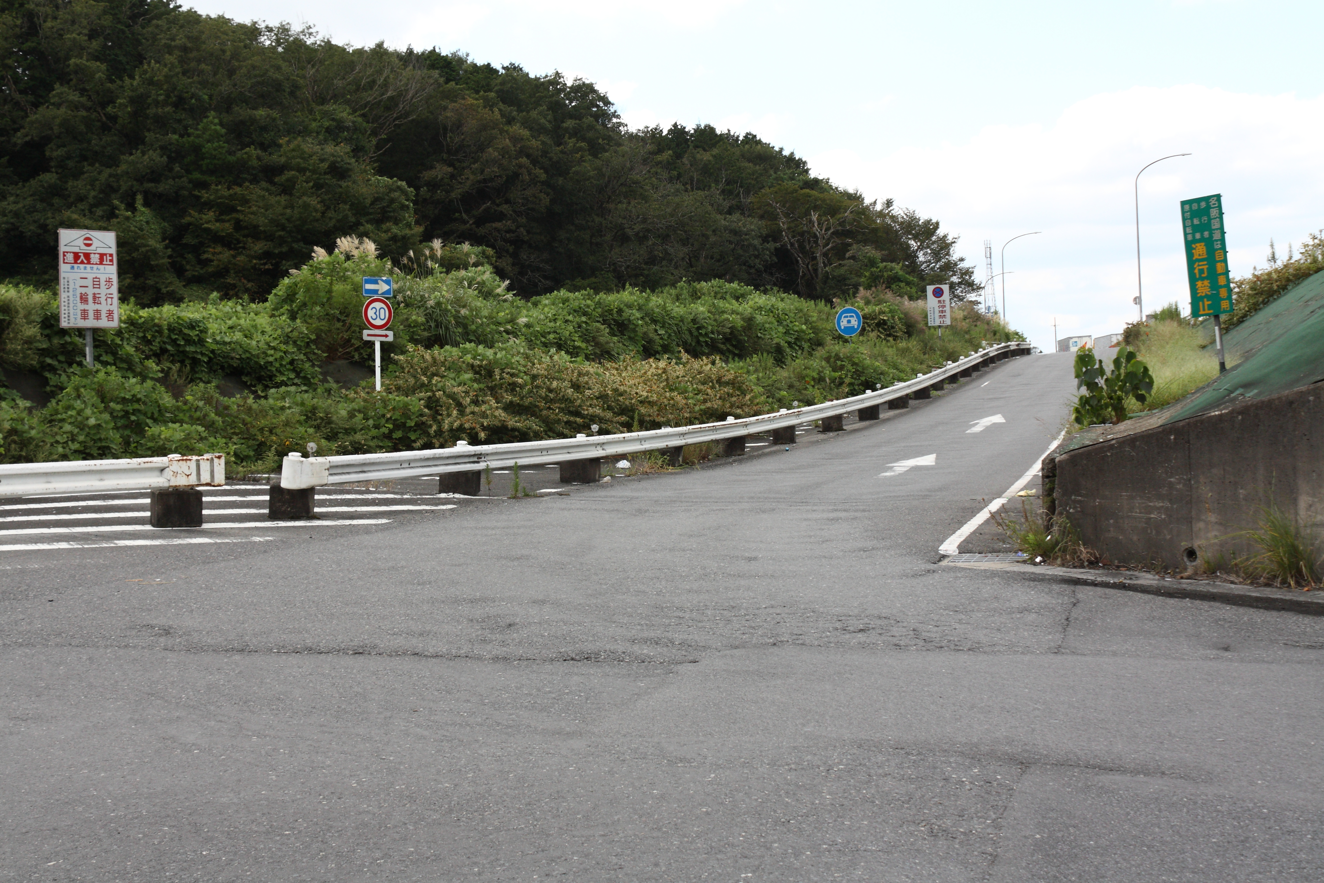 名阪国道 上柘植インターチェンジ（ダイヤモンド型） 天理方面入口 三重県伊賀市柘植町